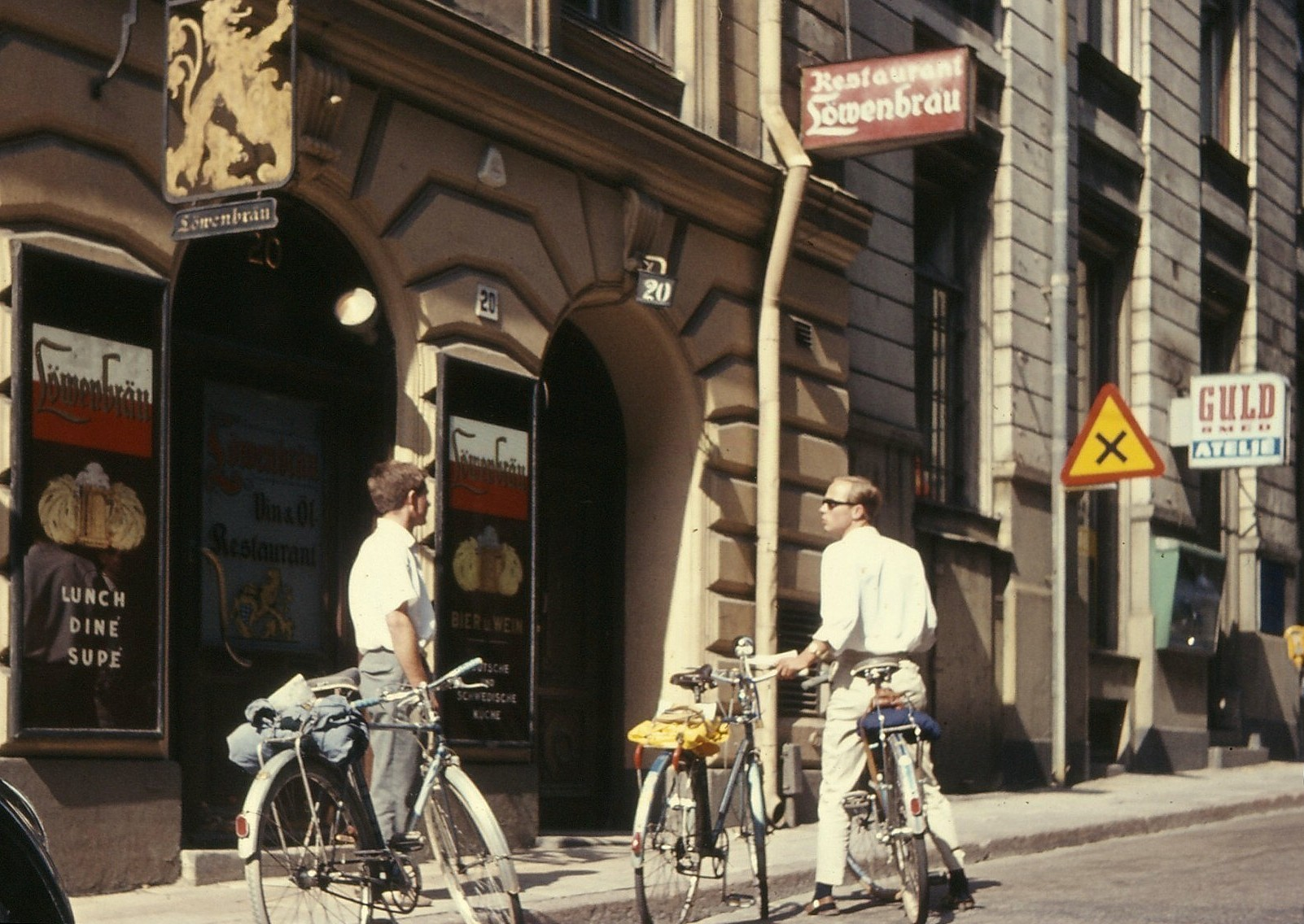 Jakobsgatan 20 i Stockholm, restaurang "Löwenbräu" har sommarstängd